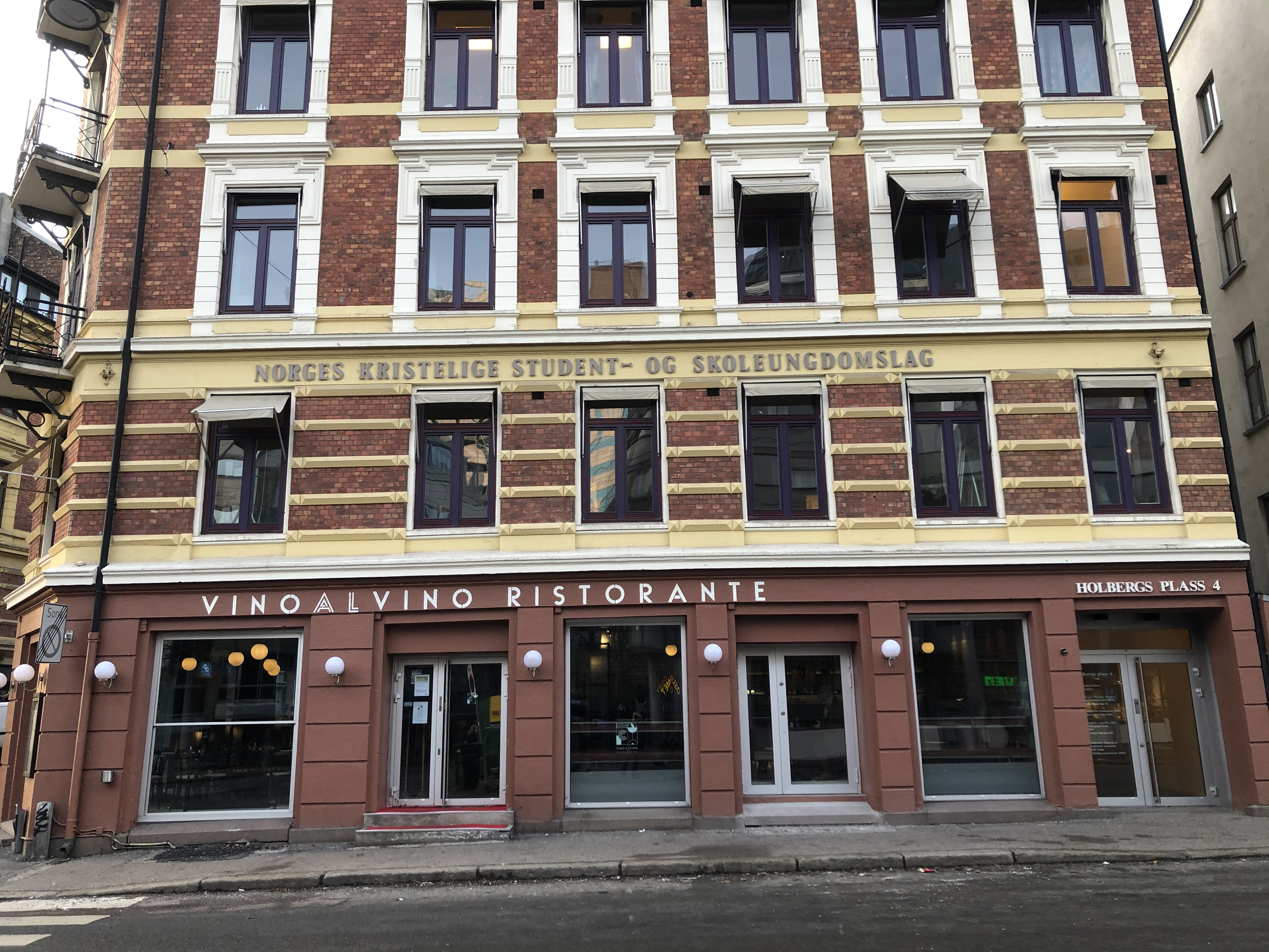 Holbergs Plass 4, Oslo (Norges kristelige Student- og Skoleungdomslag)